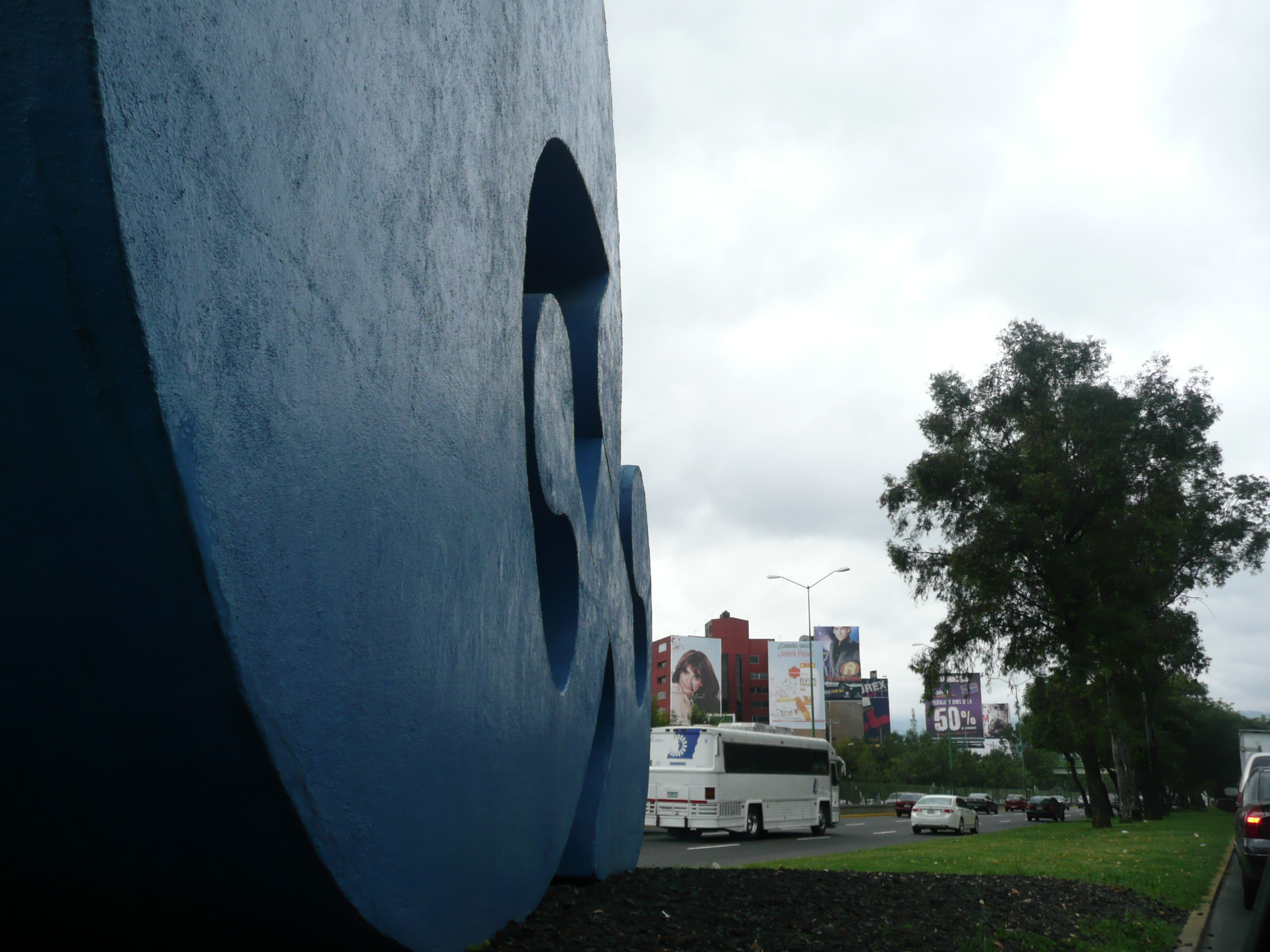 Ruta de la amistad en México previo a las obras de la autopista urbana sur